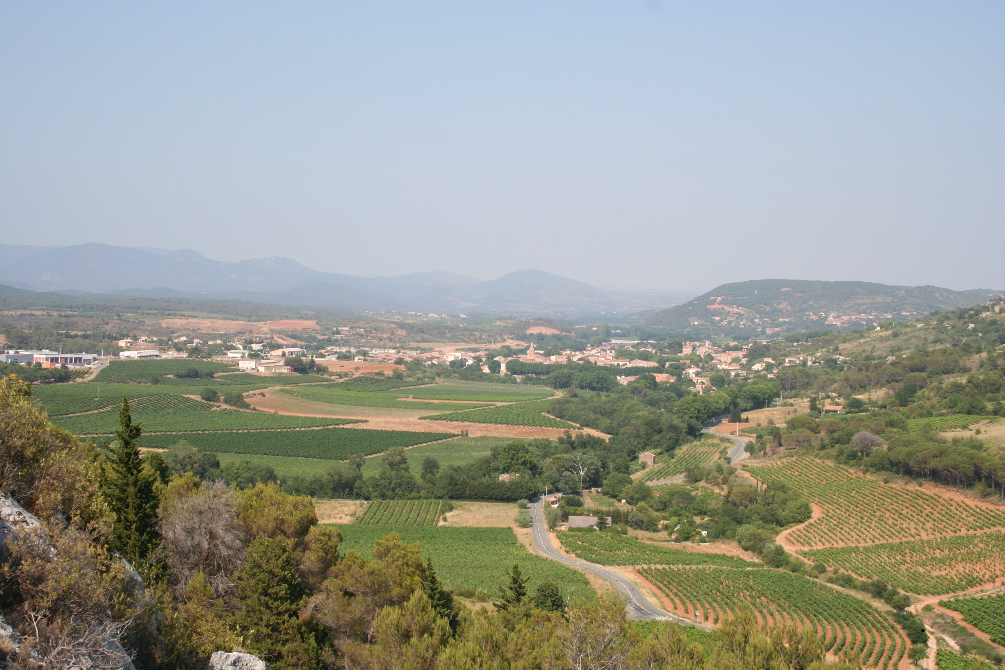 Vue d'ensemble de Saint-Chinian, Hérault, France.